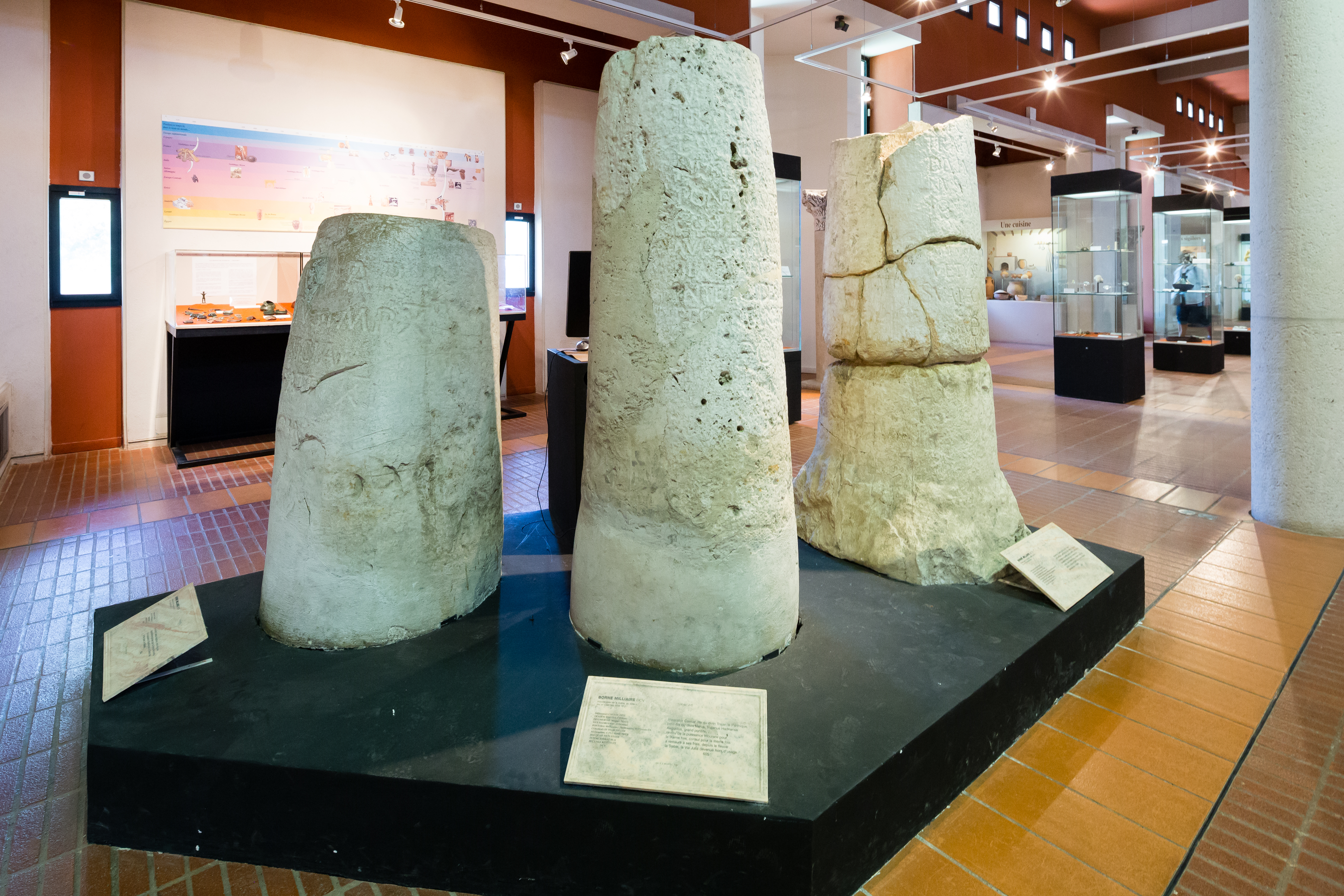 Bornes miliaires de la Via Julia Augusta provenant de La Turbie et exposées au musée archéologique de Nice-Cimiez (Alpes-Maritimes, France).